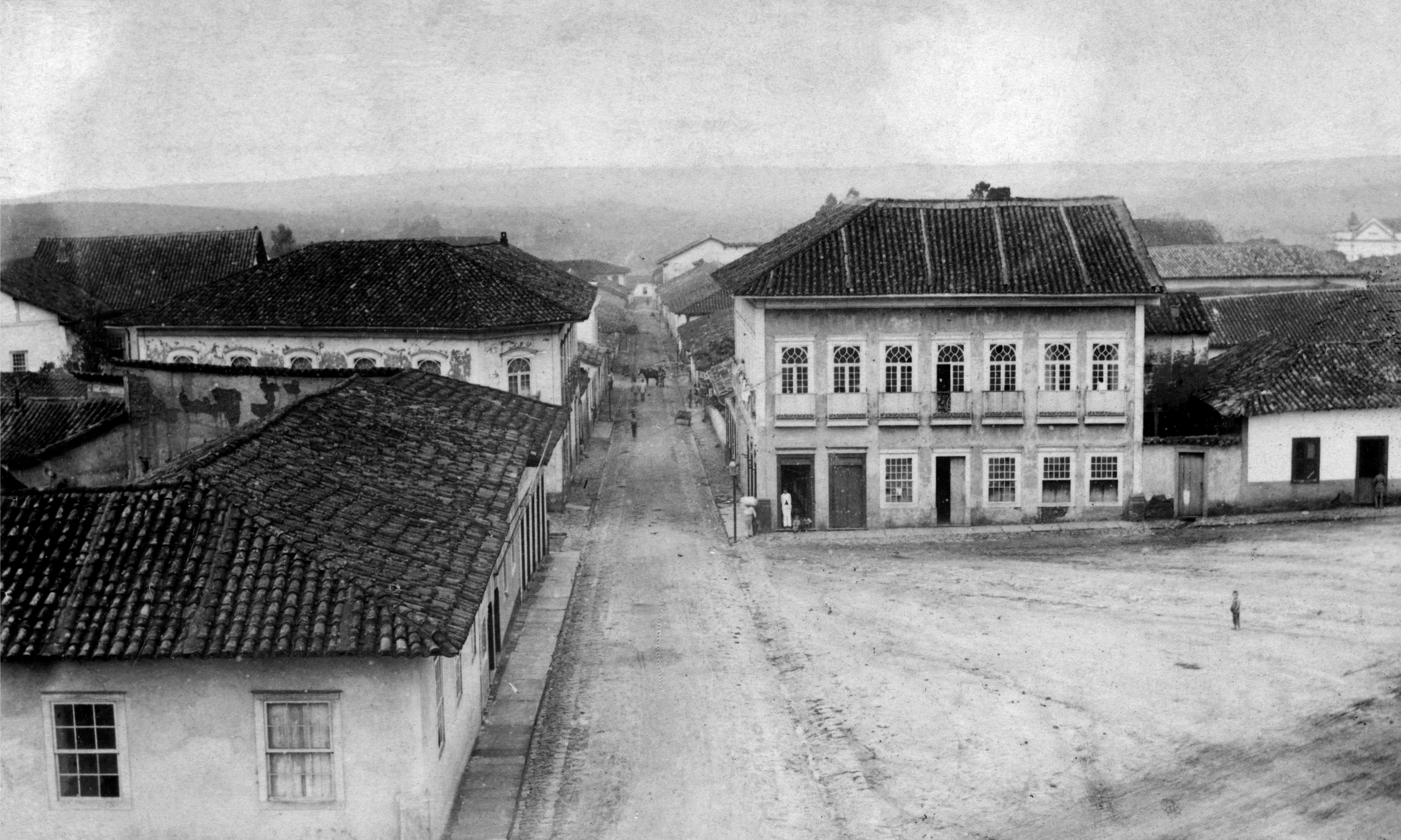 Album Fotografico - Vistas de Sorocaba - 1875-1880